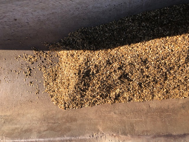 Grain In Australia